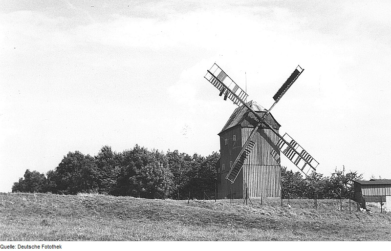 Original image description from the Deutsche Fotothek Oderwitz-Oberoderwitz. Neumannmühle, Bockmühle